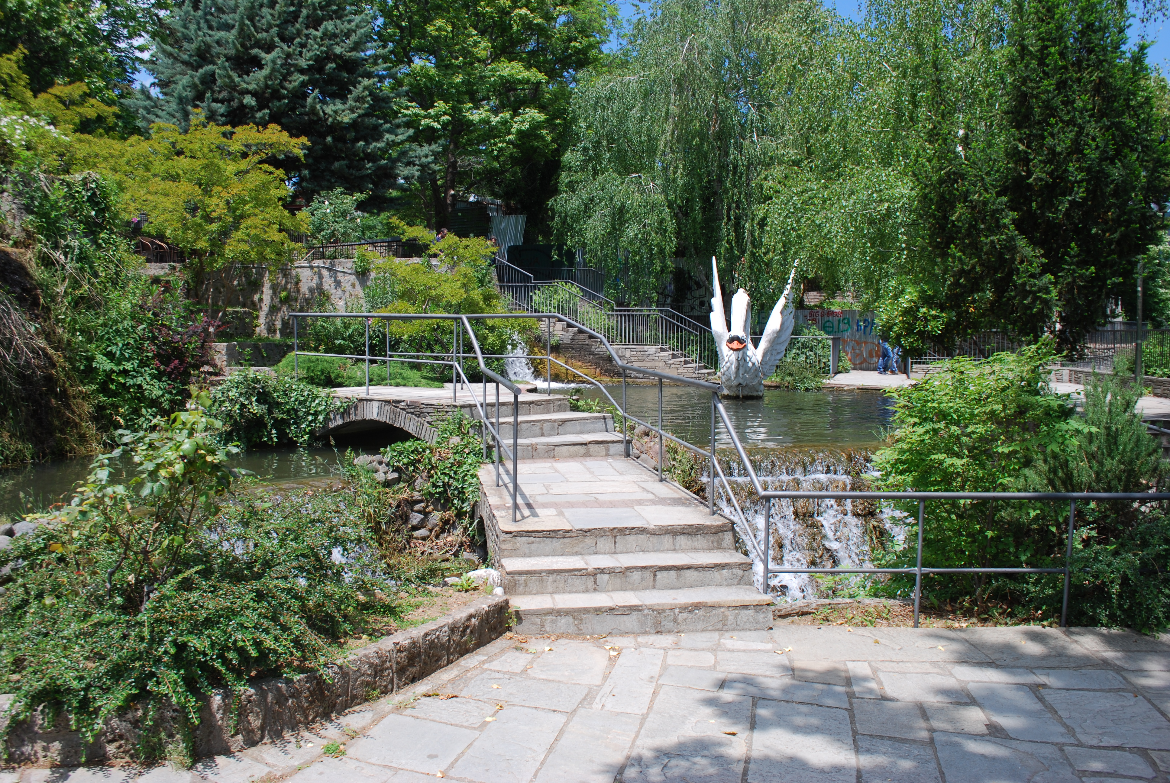 Vue des cataractes d'Edessa, en Macédoine (Grèce).